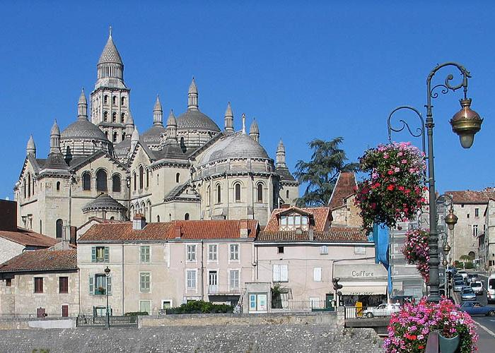 Périgueux, Cathedrale Saint Front, France, Frankfreich (30. August 2005) Photograph: Luidger